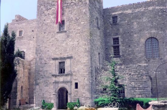 Château de Caseneuve la cours